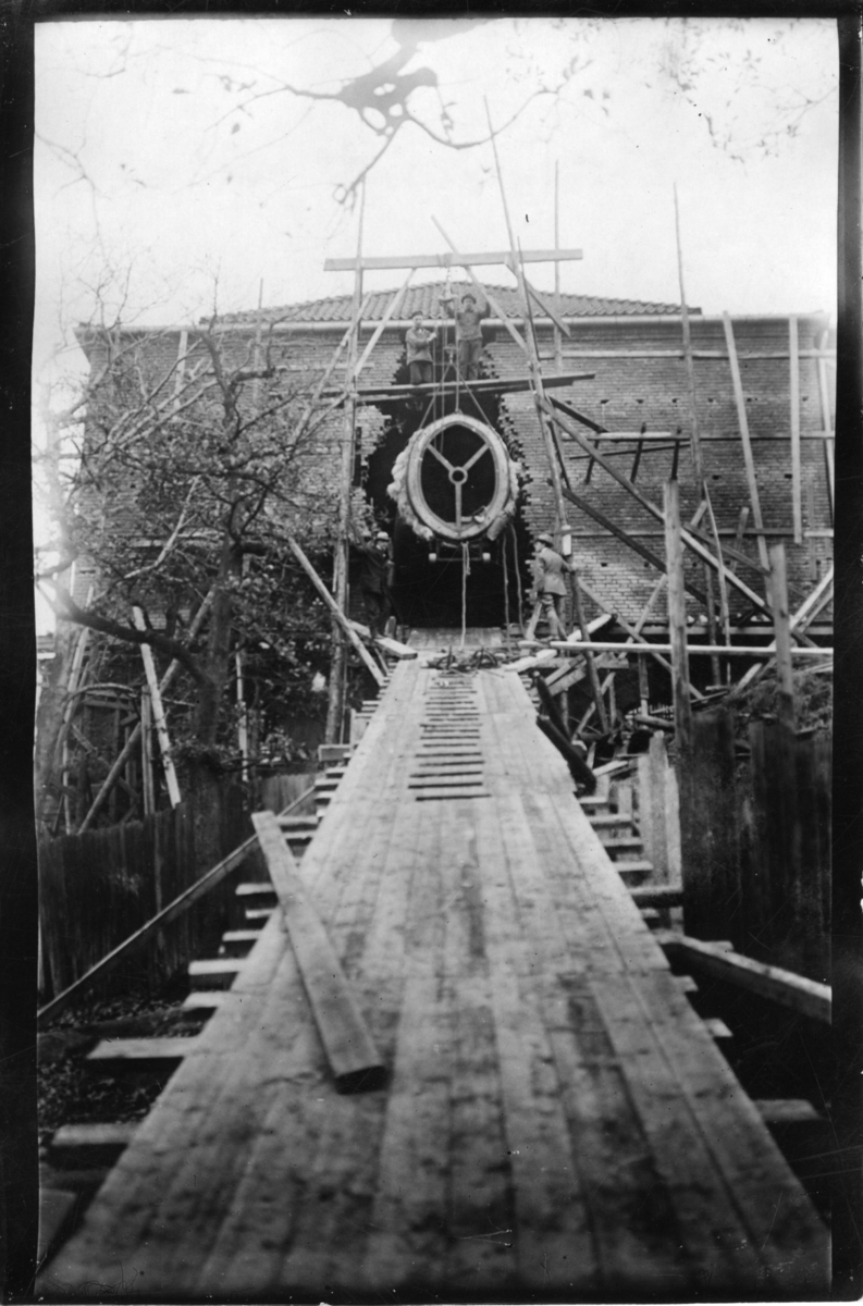 'Zoologiska avdelningens flytt: :: Största valsegmentet in på museet, just före lyftningen över tröskeln. Malmska valen. :: :: Ingår i serie med fotonr. 743-754.'